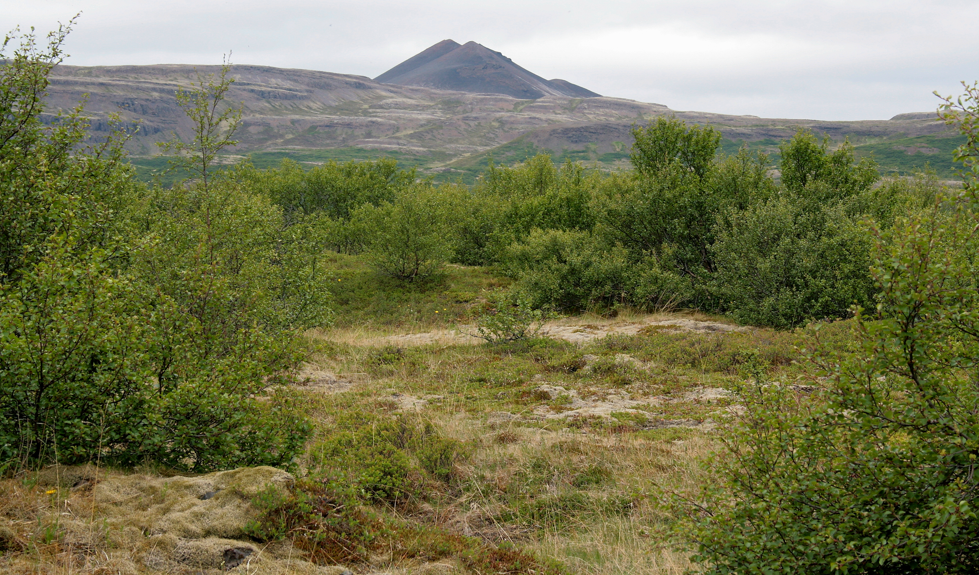 Vesturland: Am_rechten_Ufer_des_Norðurá_nahe_beim_Wasserfall_Glanni